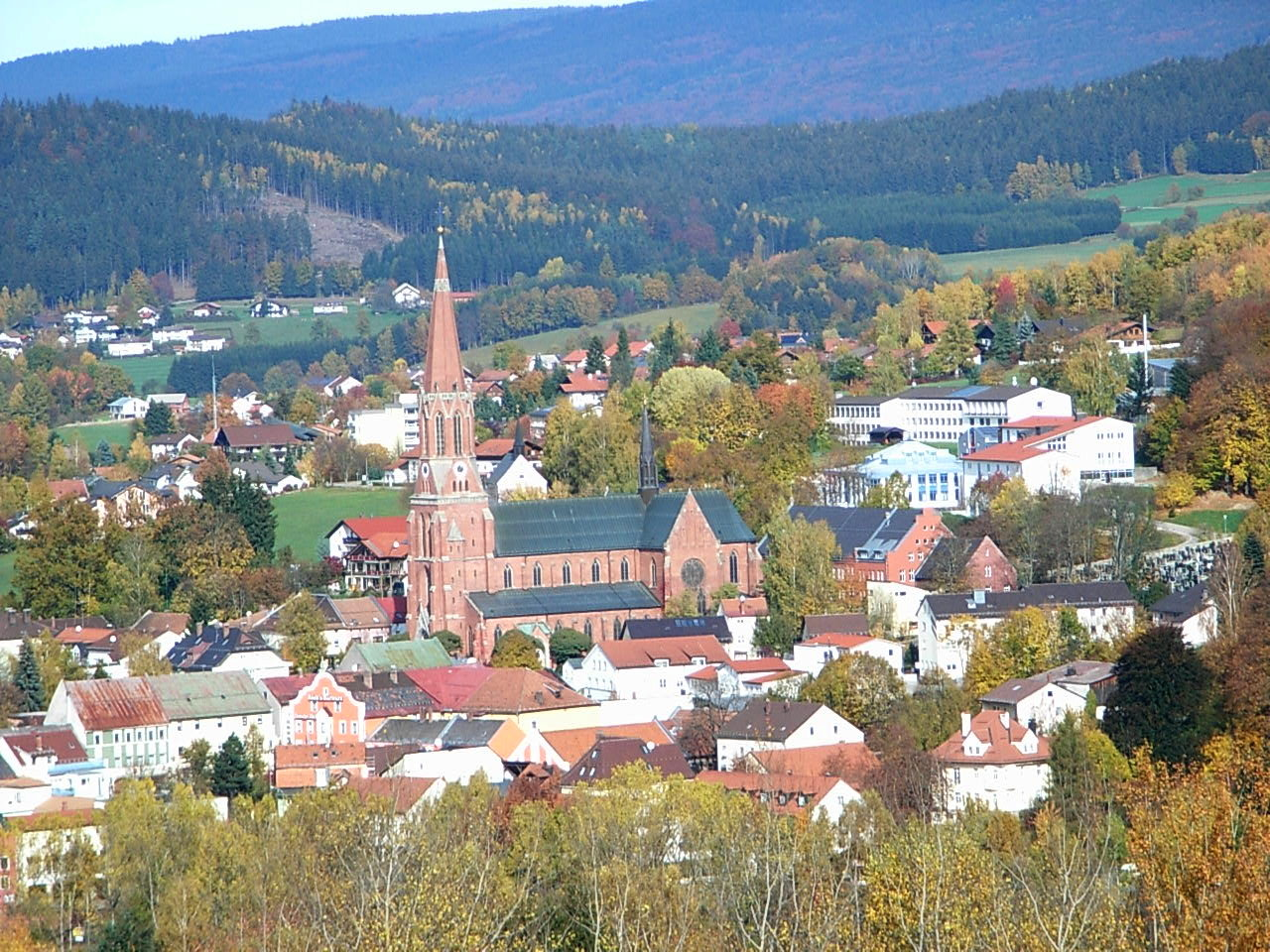 Beschreibung: Zwiesel mit Pfarrkirche St. Nikolaus *Quelle: Bild selbst erstellt *Datum: 26. Oktober 2006 *Autor: Konrad Lackerbeck